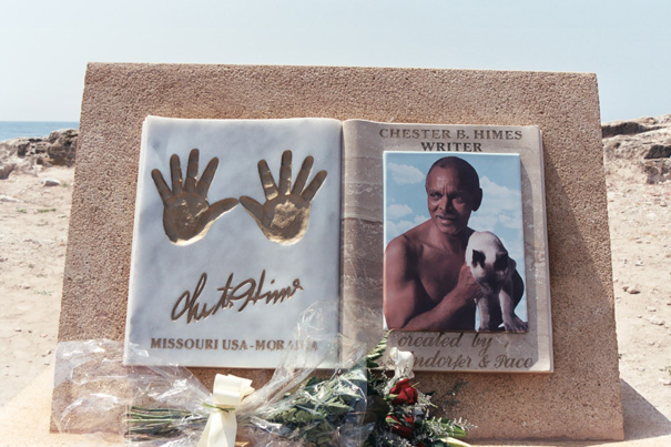 Monument en honor de l'escriptor Chester Himes, a Moraira